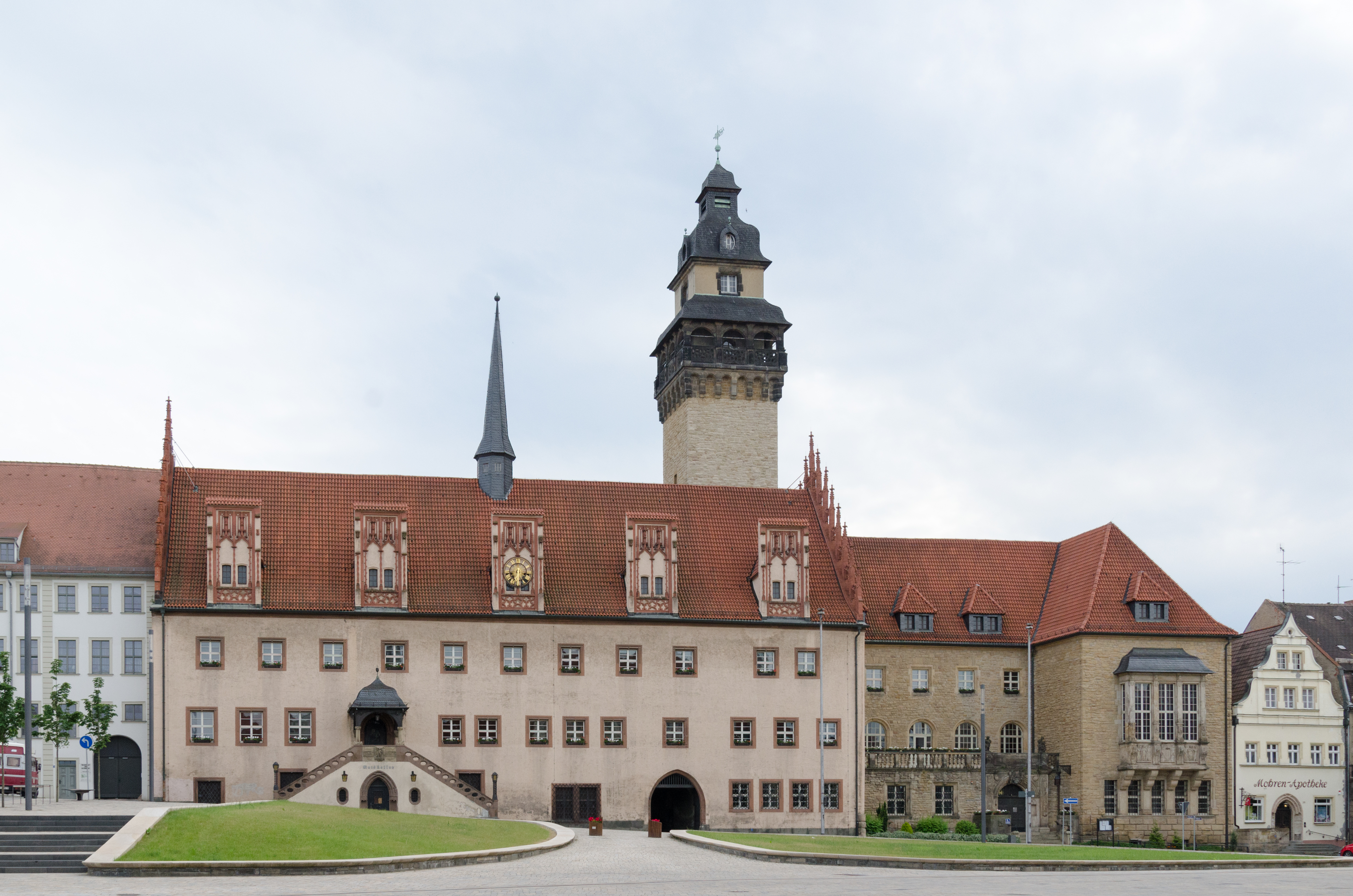 Zeitz, Altmarkt 1, Rathaus